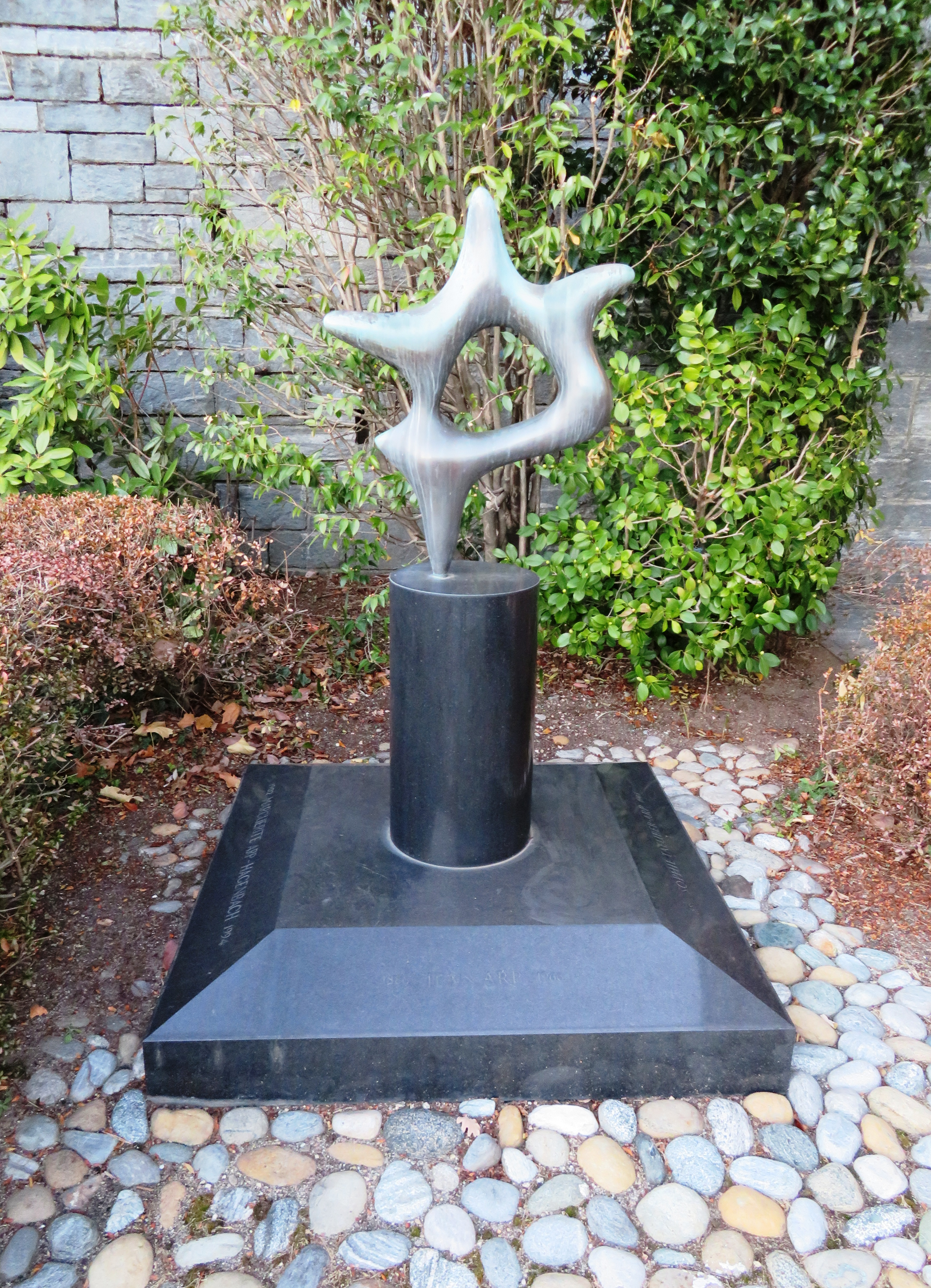 Grab von Hans Arp, Sophie Taeuber-Arp und Marguerite Arp-Hagenbach Friedhof Locarno (Schweiz)